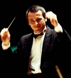 Pascal Verrot, Chef d'orchestre français